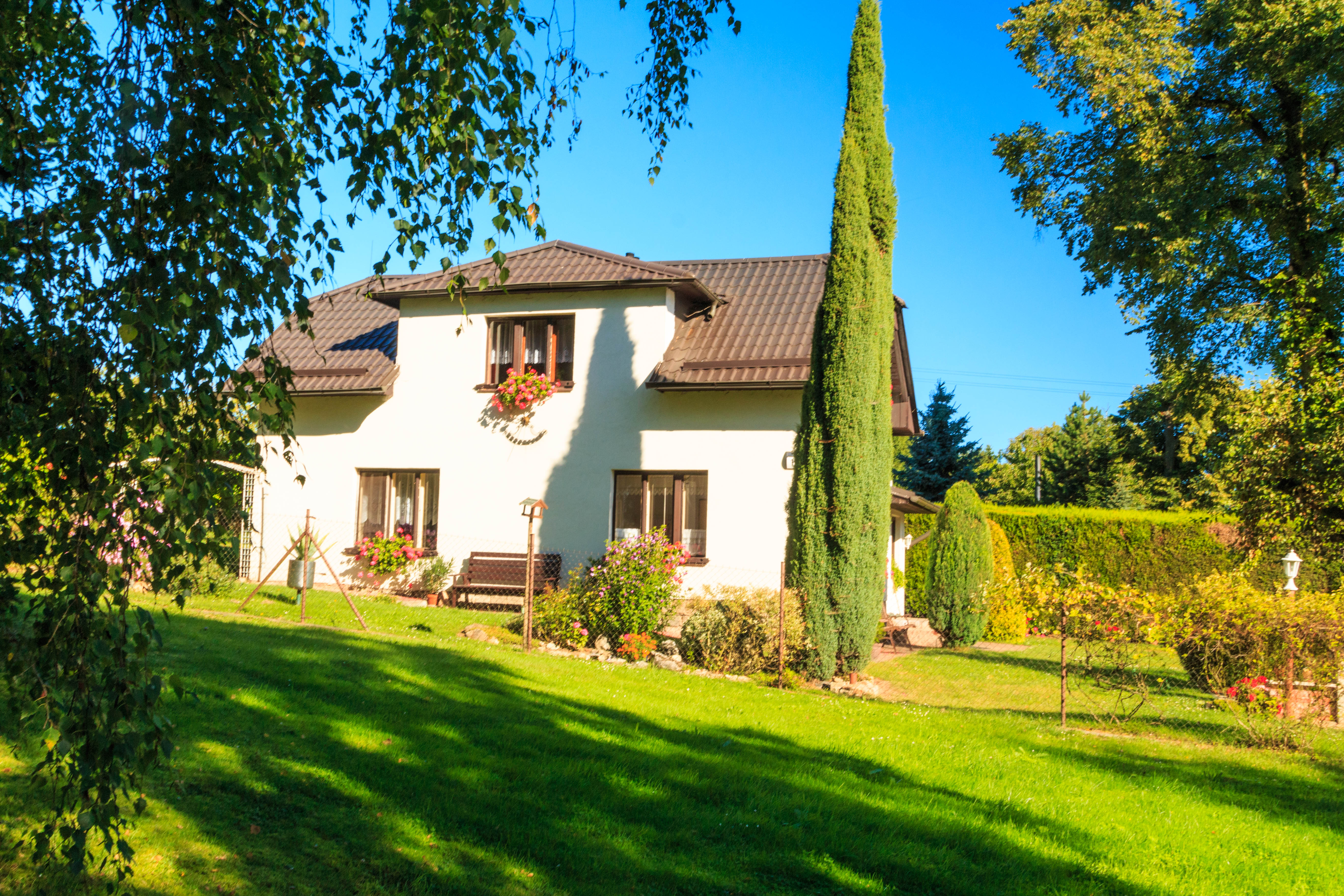 Sychrov u Kozlova - čp. 11